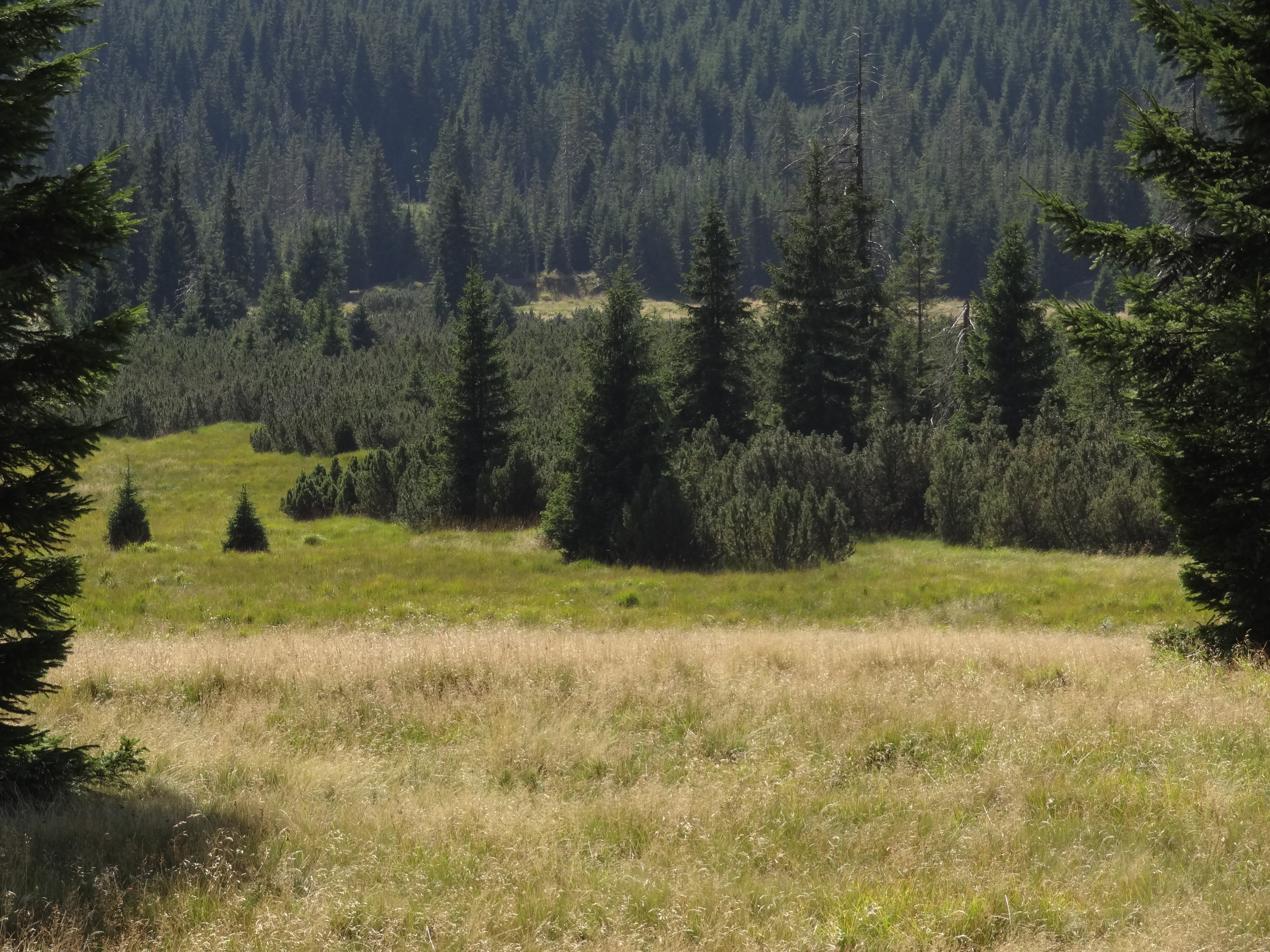 NPR Rašeliniště Jizery a Rezerwat przyrody Torfowiska Doliny Izery